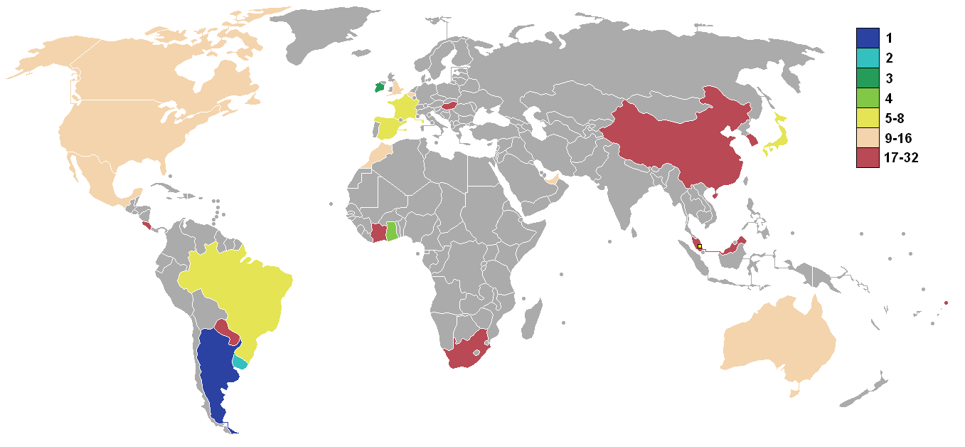 Copa disputada en Malasia.